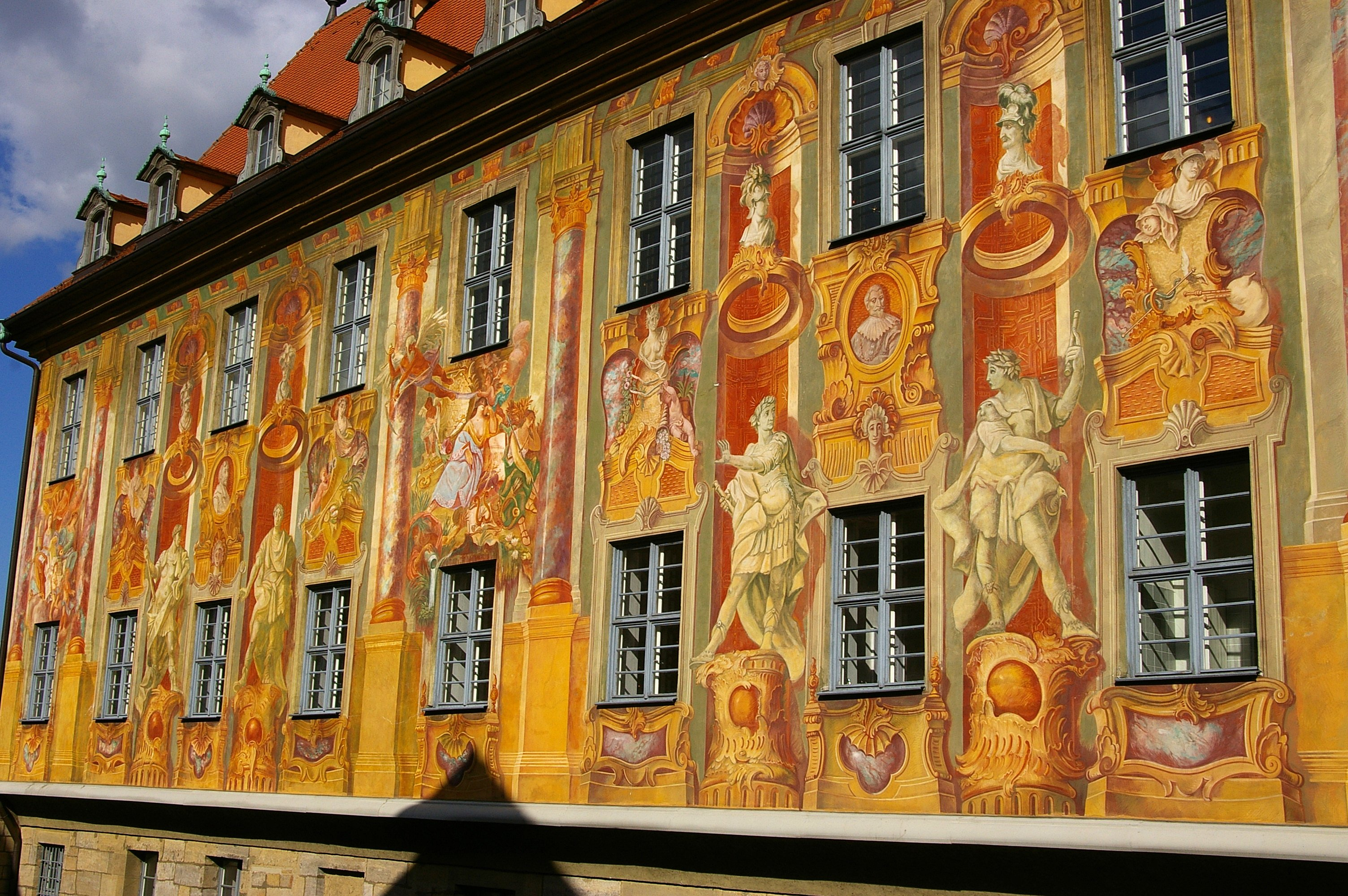 Bamberg - Rathaus - Fassadenmalerei